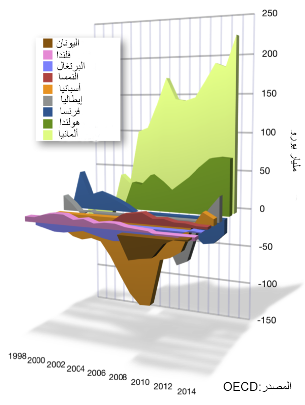 مخطط بياني عن اختلالات الحساب الجاري للدول الأوروبية